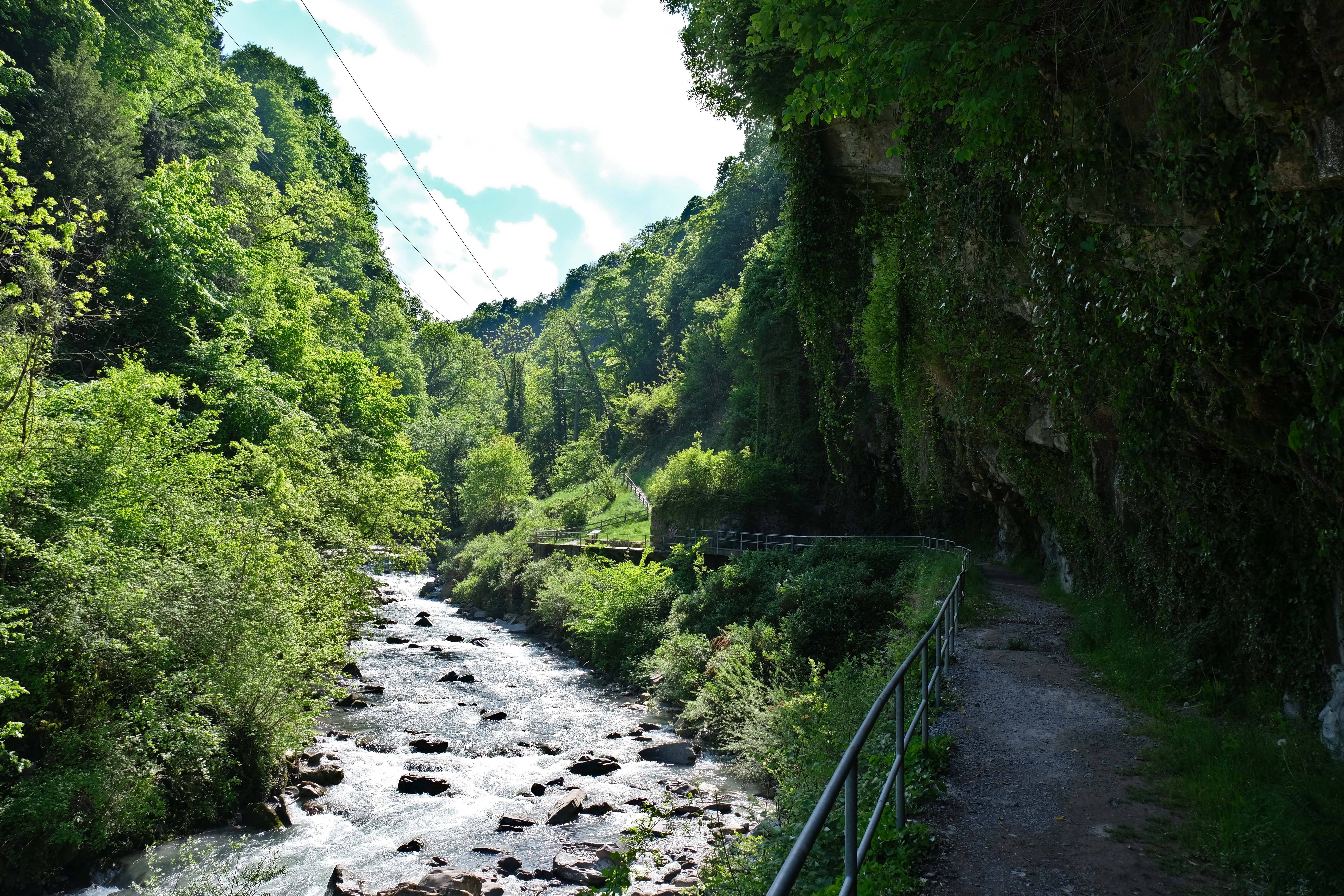 Les gorges de la Vièze à Monthey en 2020.